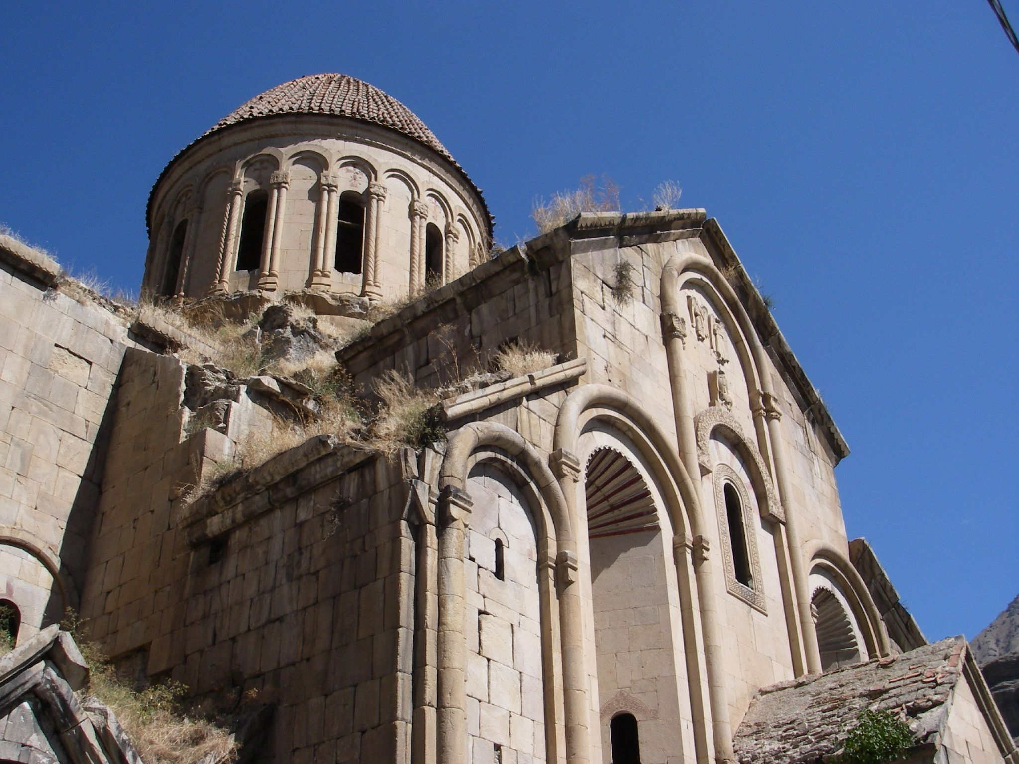 Öşk Vank